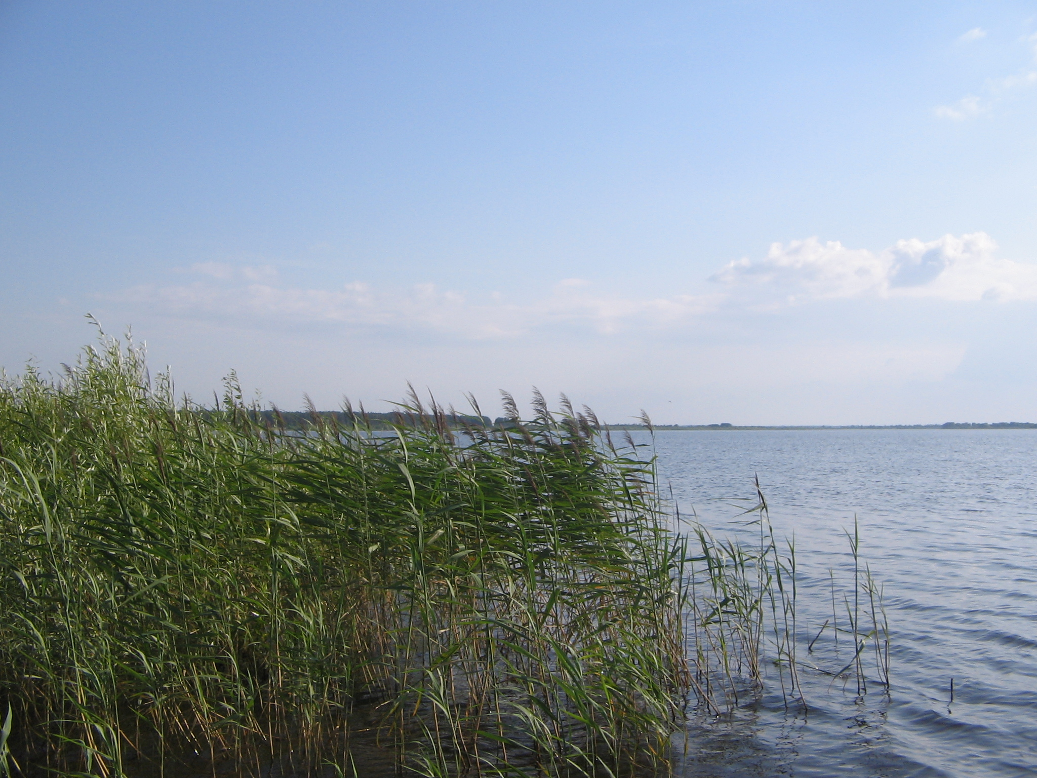 Вид с берега водохранилища Погост (Пинский район Брестской области Белоруссии)